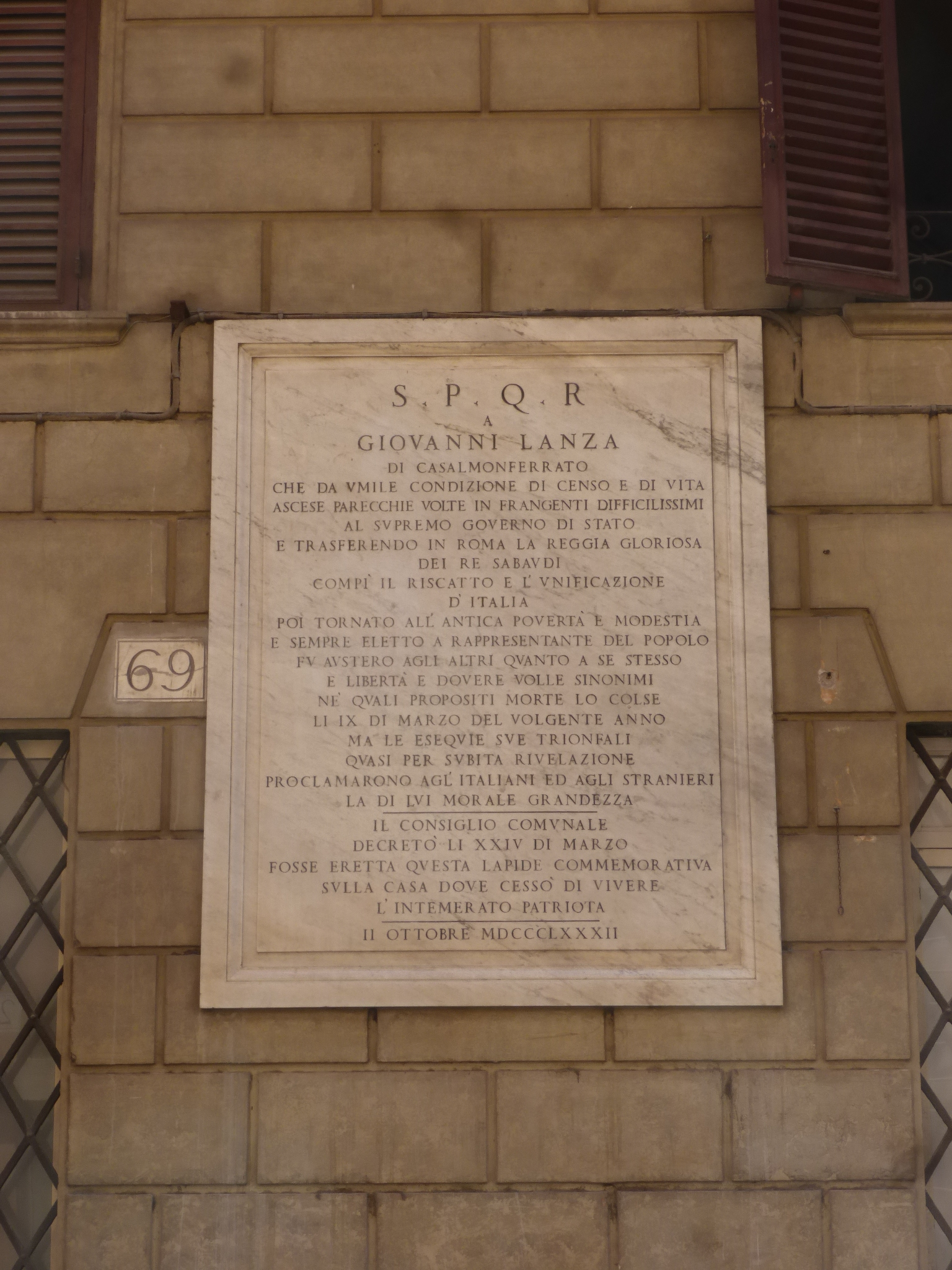 Roma, via Bocca di Leone. Memoria di Giovanni Lanza sulla casa in cui morì (1882).